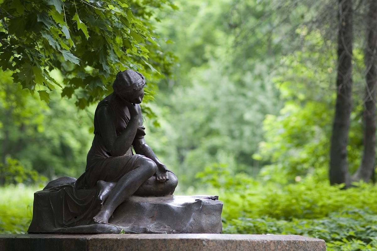 Скульптура "Дева с кувшином".